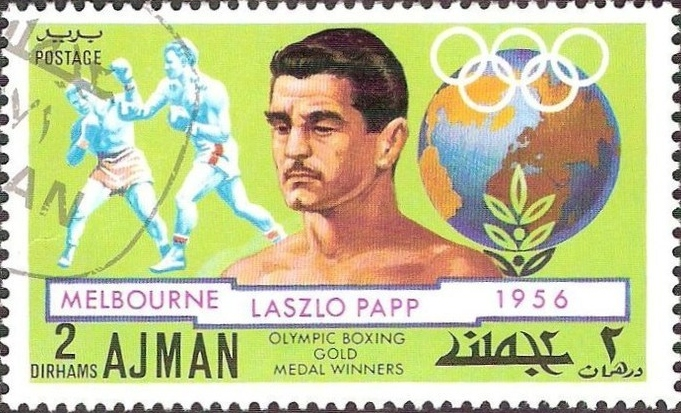 László Papp